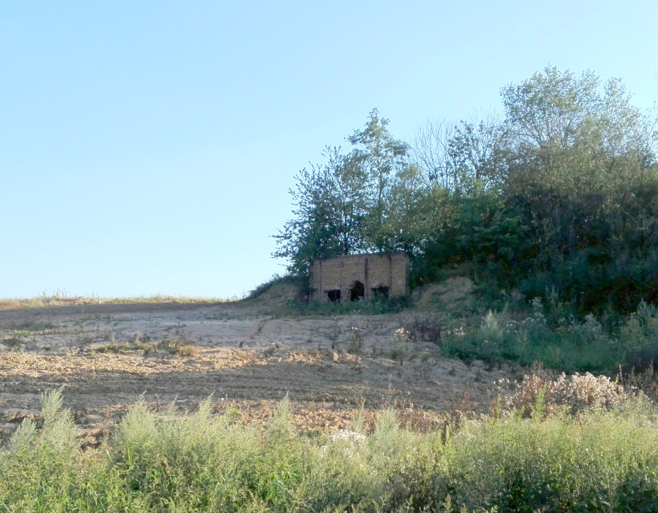 Krzyżkowice, kulochwyt na byłej strzelnicy Strażnicy WOP Krzyżkowice